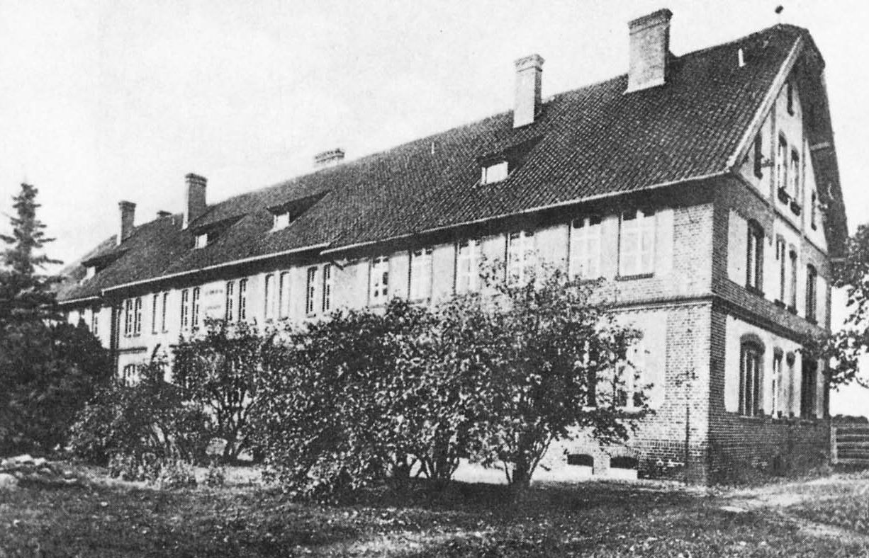 Fotografie des Knabenerziehungsheims Emmaus in Muschaken, Ostpreußen